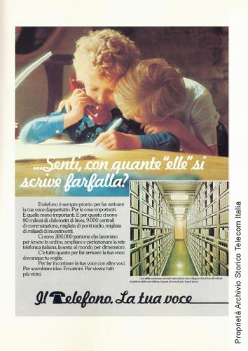 Inserzione pubblicitaria di Telecom Italia